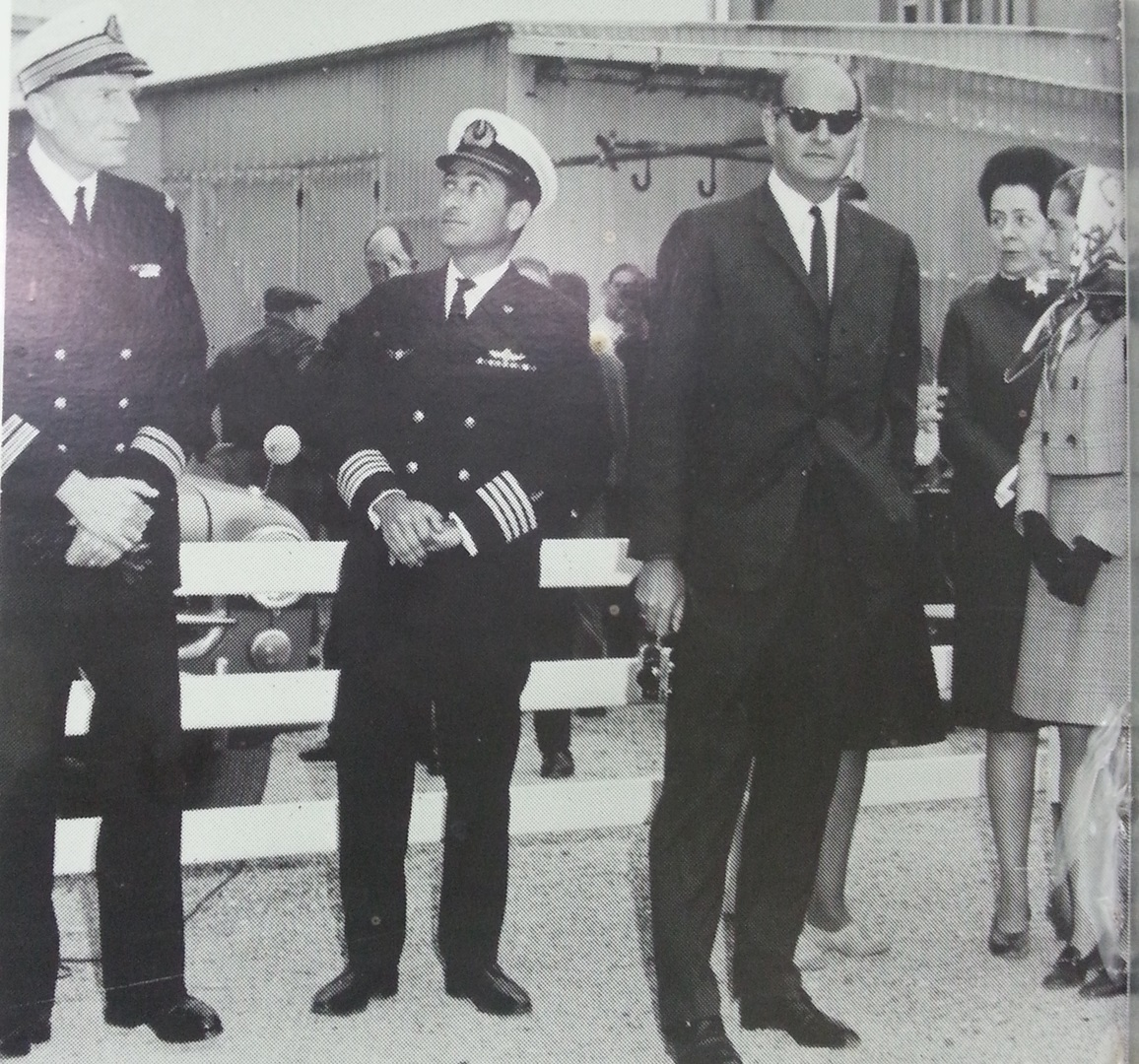 מכובדים בעת השקת ספינת סער בשרבורג. משמאל לימין: אדמירל רוסליו, מפקד השייטת הדר קמחי וראש משלחת משרד הביטחון בפאריס מרדכי לימון